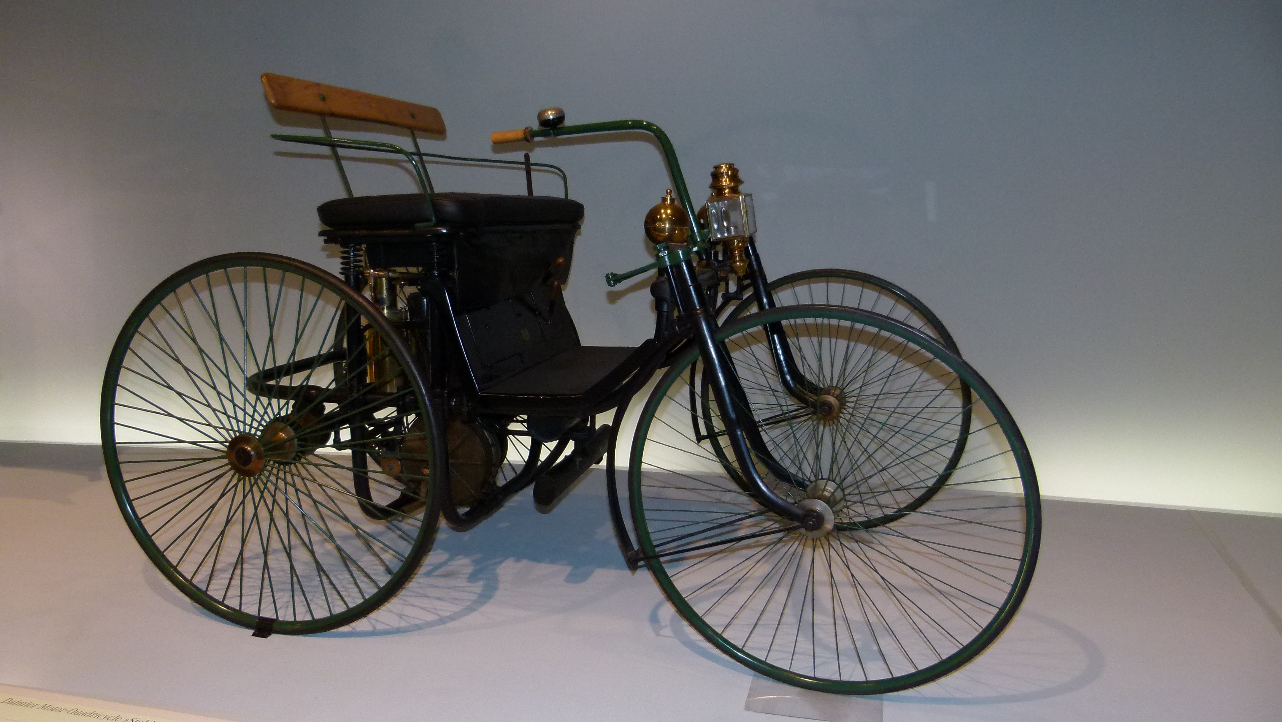 Daimler Stahlradwagen - 1889, 1,5 PS, 18 km/h - Mercedes-Benz-Museum, Stuttgart, Bad Cannstatt